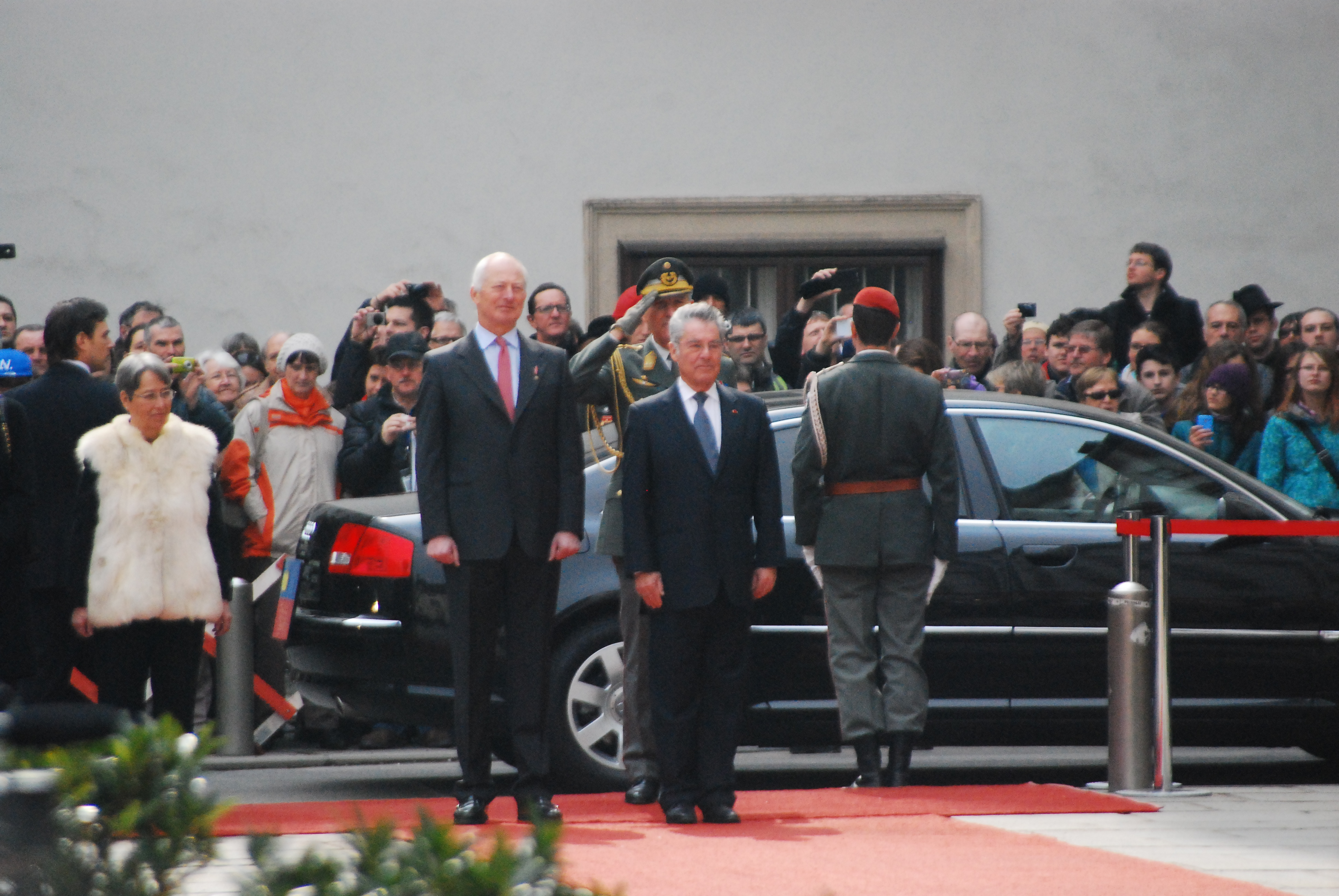 Margit Fischer, Fürst Hans-Adam II. von und zu Liechtenstein und Bundespräsident Heinz Fischer anlässlich eines Staatsbesuchs im Inneren Burghof in Wien